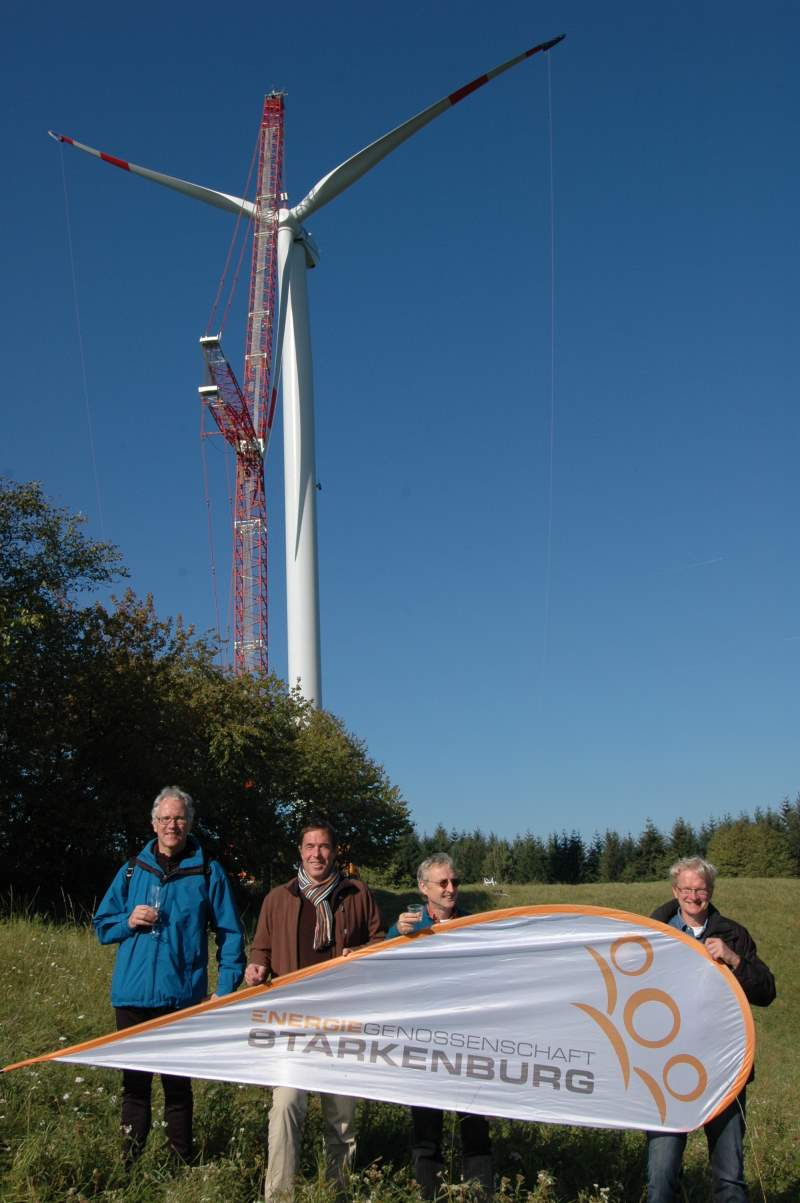 Bürgerwindrad der Energiegenossenschaft Starkenburg (seit 10.12.2011 am Netz)